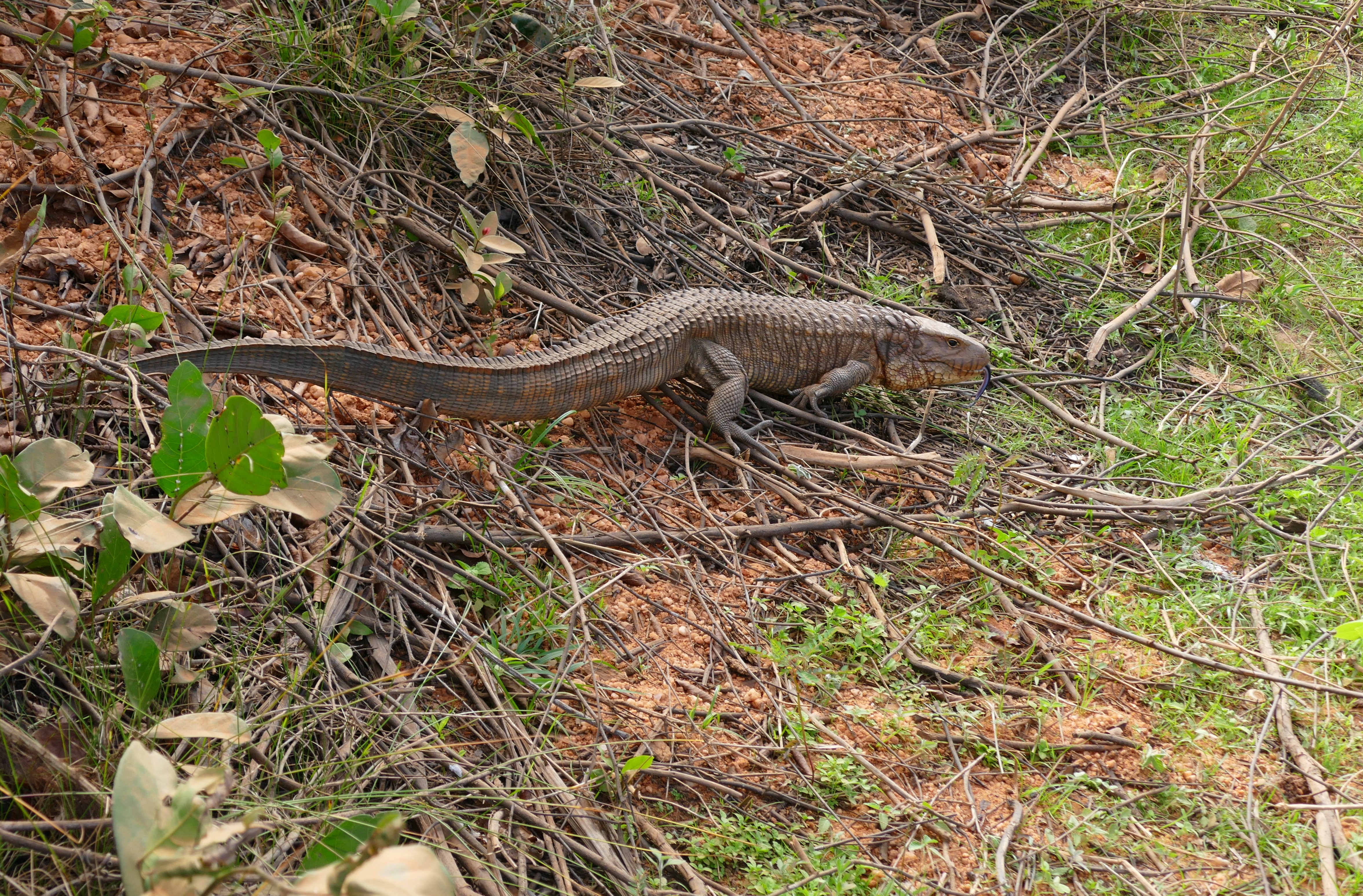 Transpantaneira, Poconé, Mato Grosso, BRAZIL